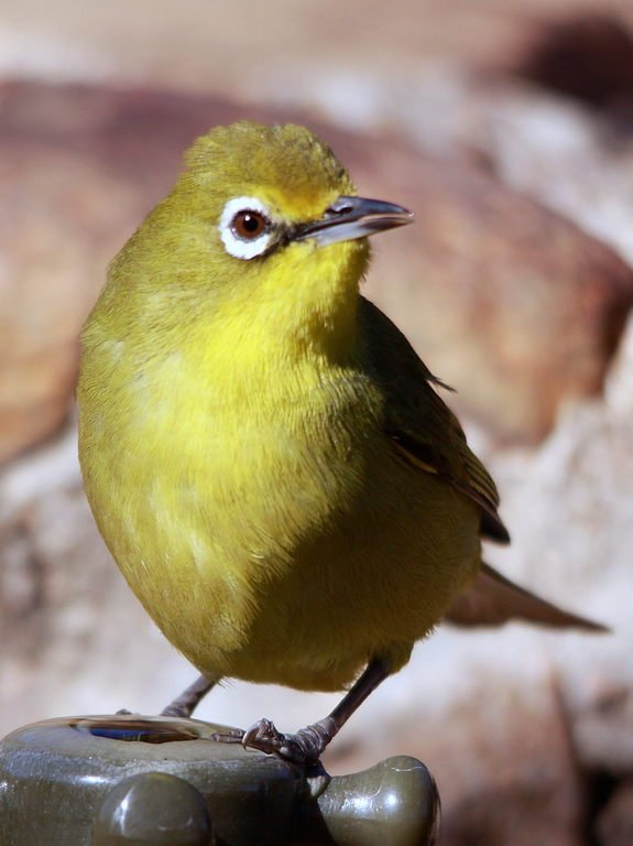 Cape White-eye, Zosterops virens virens at Suikerbosrand Nature Reserve